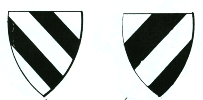 Wappen der Herrn von Tann